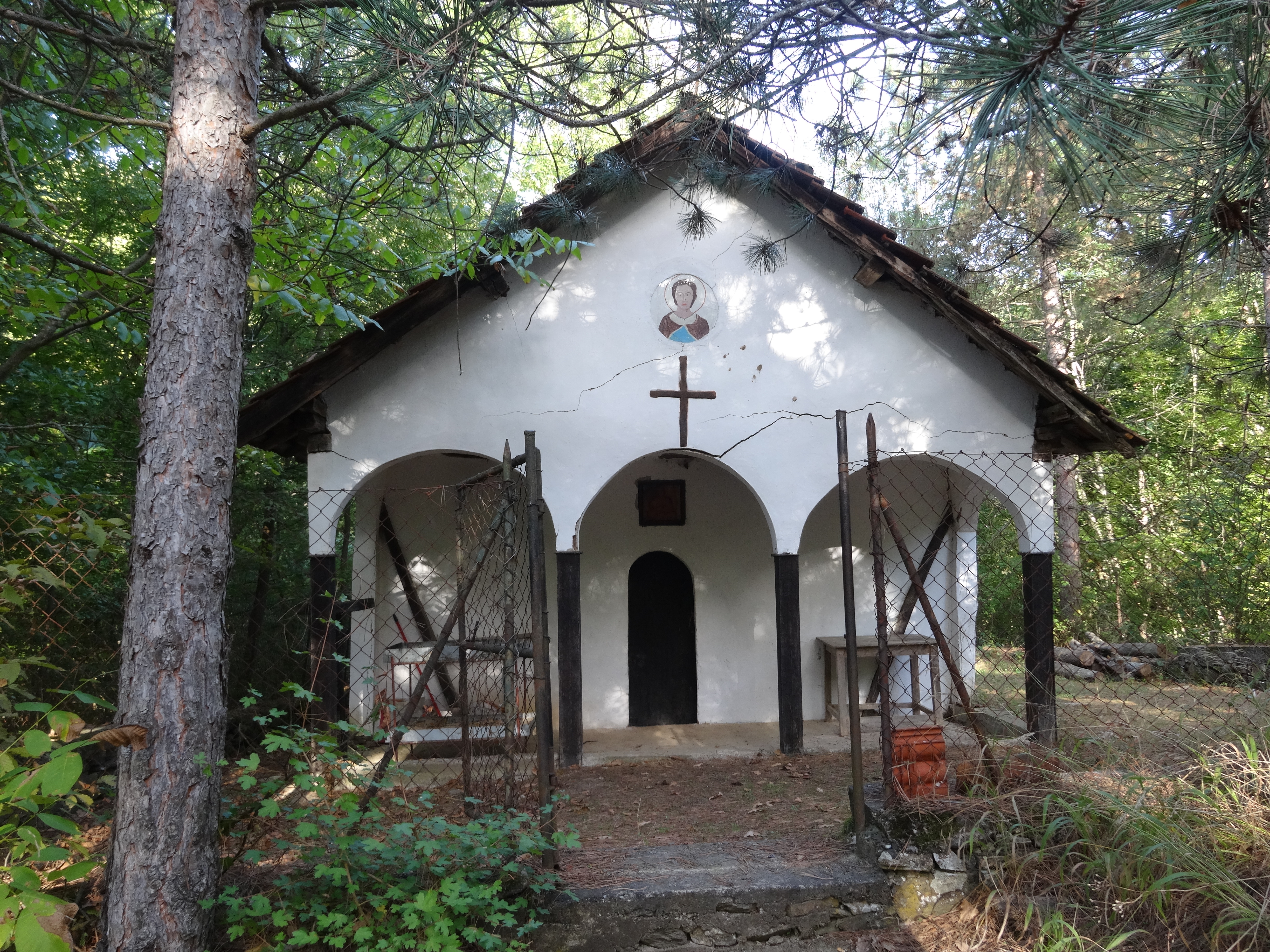 Gorina, Leskovac